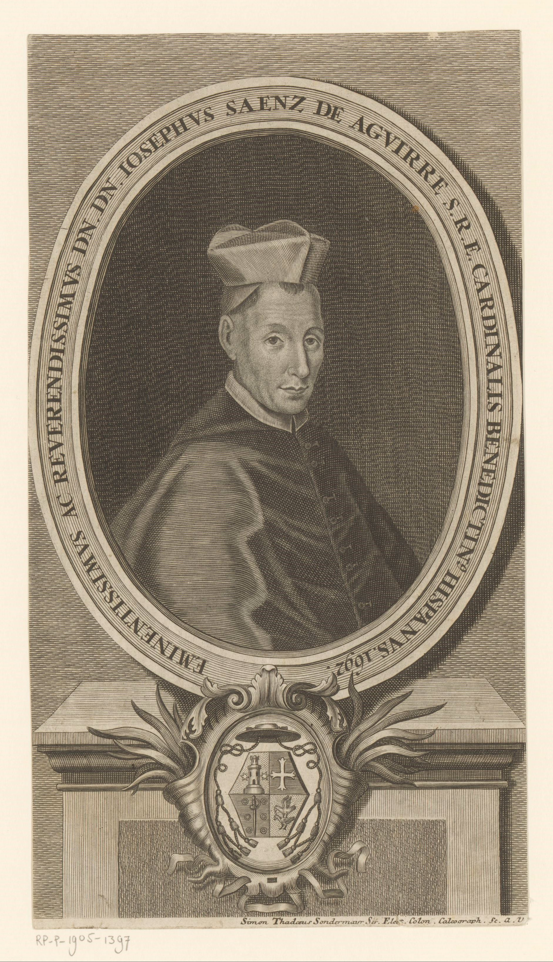 IdentificatieTitel(s): Portret van kardinaal José Sáenz de AguirreObjecttype: prent Objectnummer: RP-P-1905-1397Opschriften / Merken: verzamelaarsmerk, verso, gestempeld: Lugt 2228VervaardigingVervaardiger: prentmaker: Simon Thaddäus Sondermayr (vermeld op object)Plaats vervaardiging: AugsburgDatering: 1691Materiaal: papier Techniek: graveren (drukprocedé)Afmetingen: blad: h 260 mm (binnen plaatrand afgesneden) × b 144 mm (binnen plaatrand afgesneden)OnderwerpWat: historical personscardinalarmorial bearing, heraldryWie: José Sáenz de AguirreVerwerving en rechtenVerwerving: aankoop 1905Copyright: Publiek domein